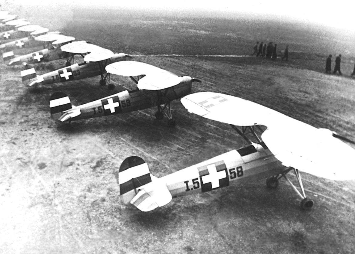 A Levente II. első 10 db-os szériájának átadása Csepelen 1943-ban